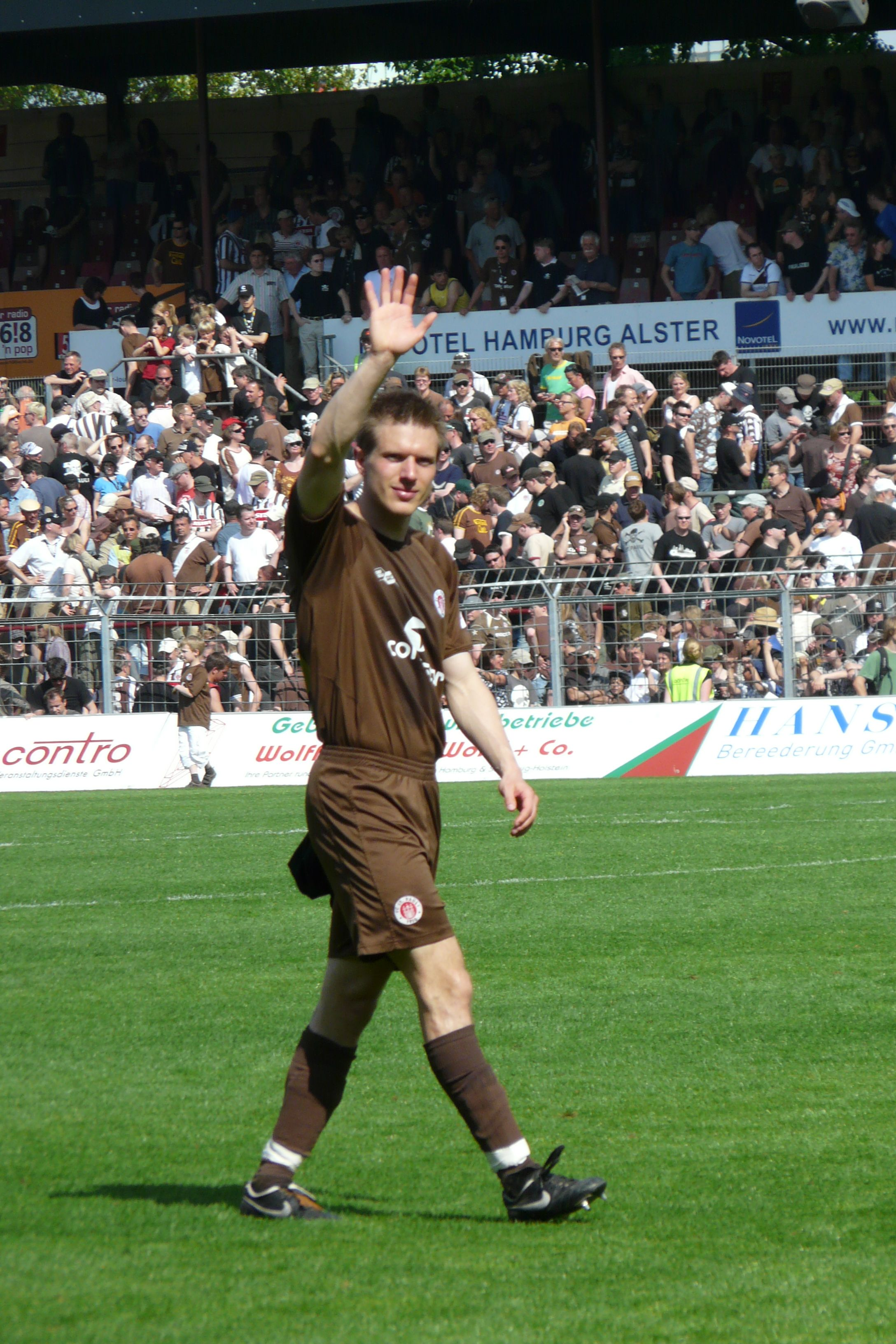 Carsten Rothenbach, Spieler des FC St. Pauli